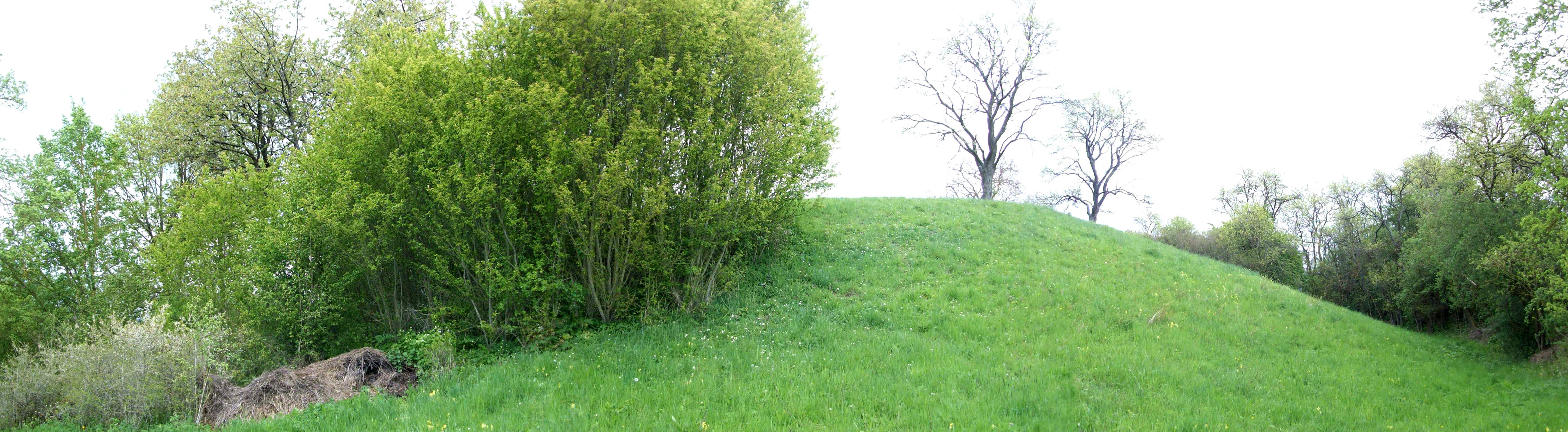 Burgstall Erbshausen: Blick auf den Turmhügel von der flachen Terasse südwestlich zum Burghügel Ri. Nordosten